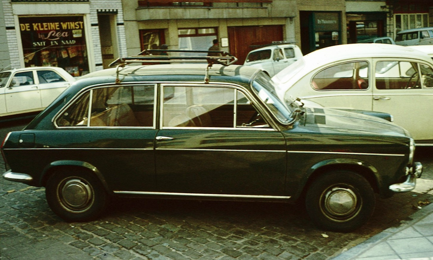 Autobianchi Primula in Benelux